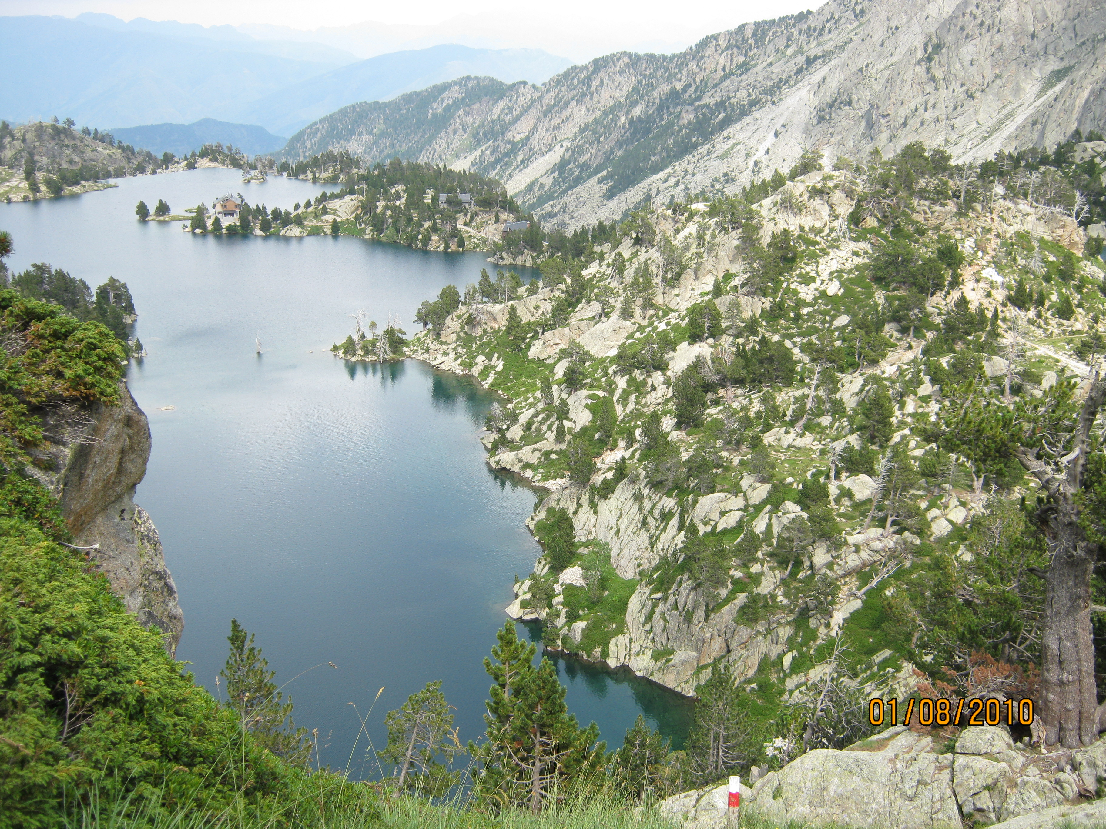 Estany Tort de Peguera - Refugi JM. Blanc. Aigües Tortes